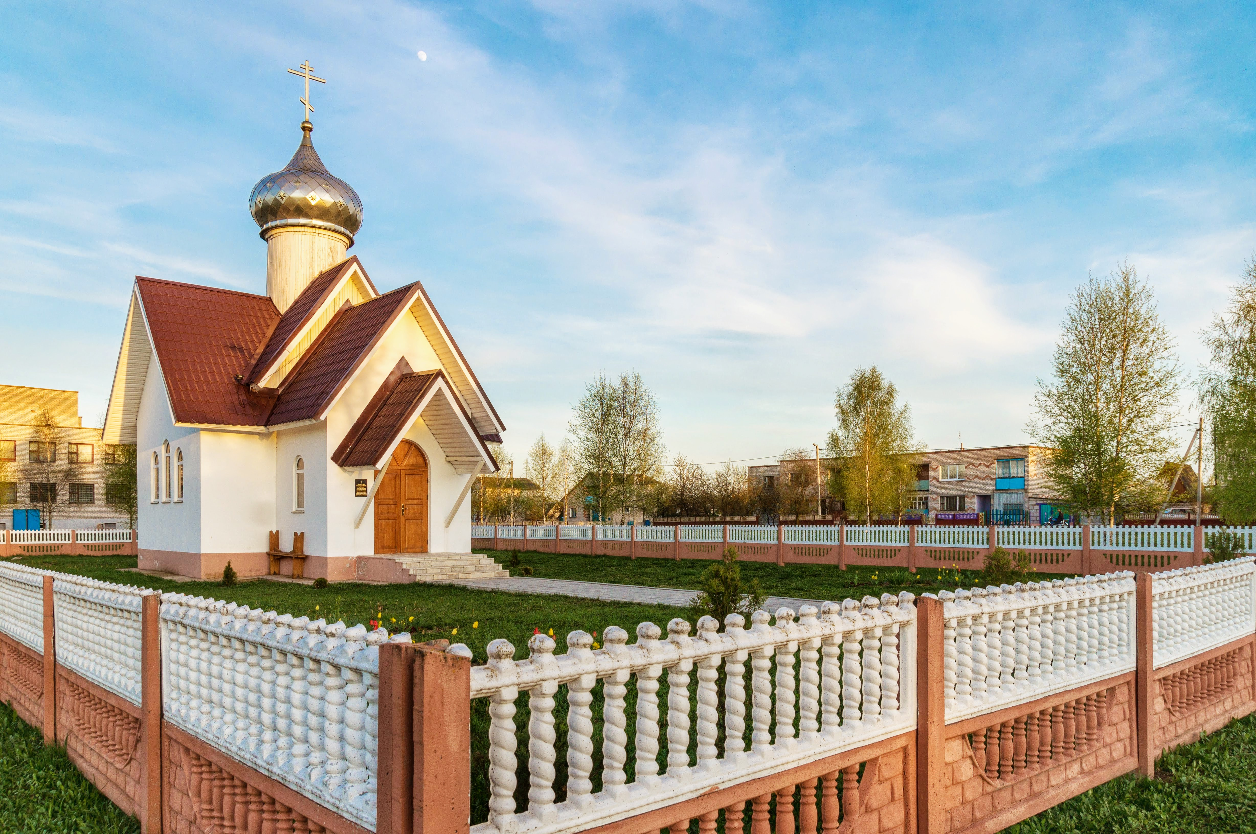 Капліца Святой Праведнай Ганны (Лыцавічы)